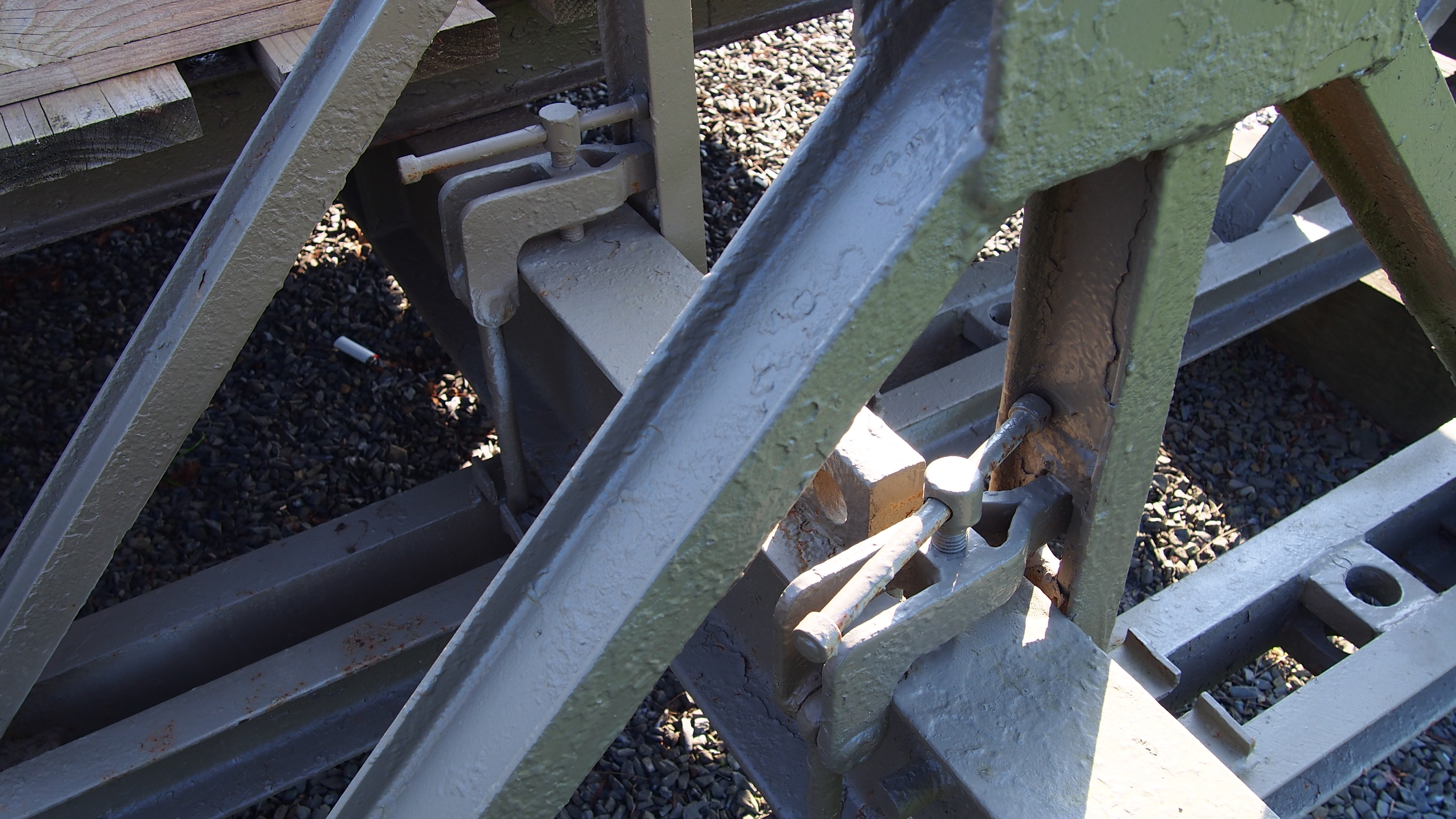 Pont-Farcy (Normandie, France). Détail du pont Bailey.